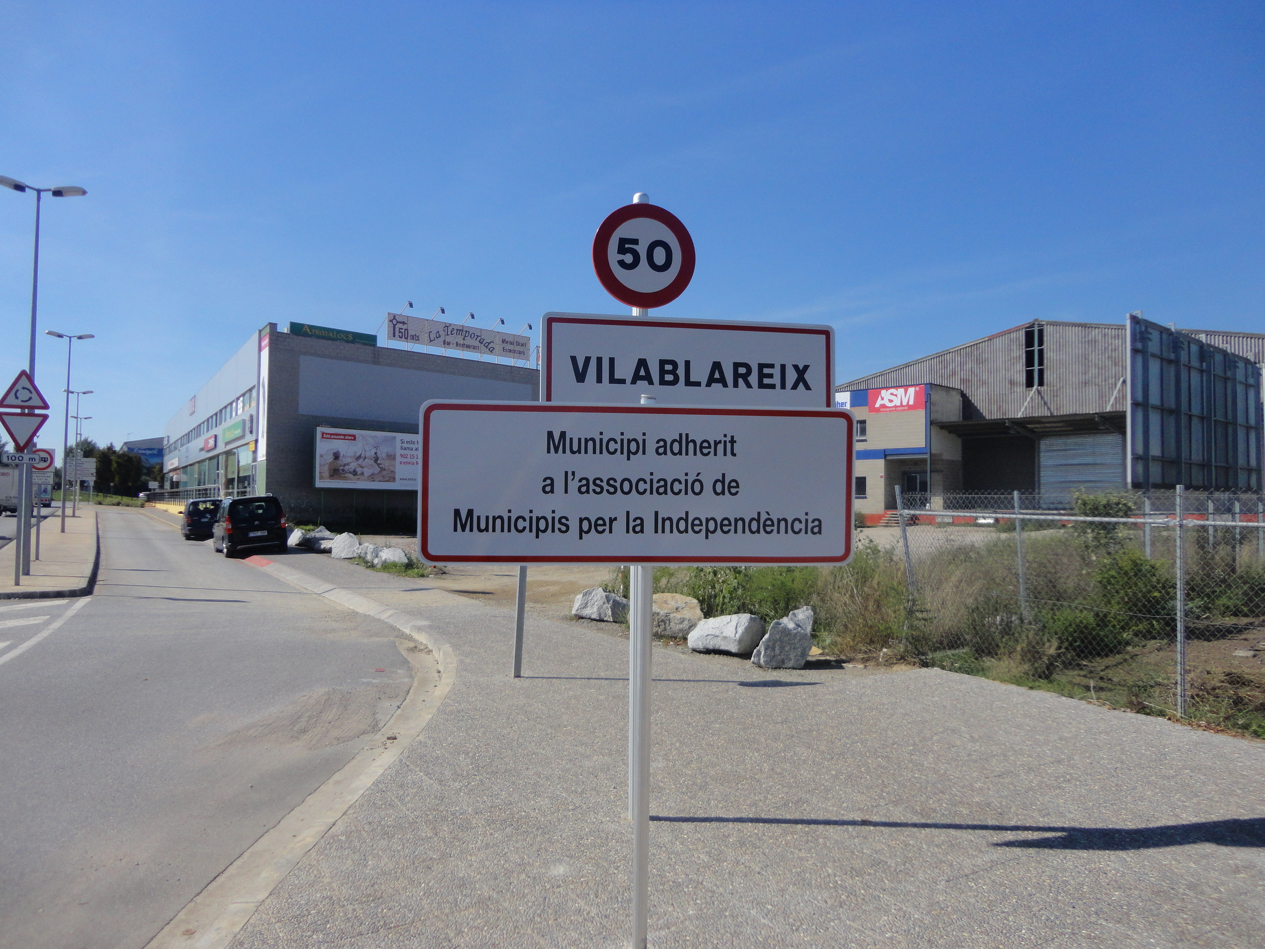 Rètol de l'entrada de Vilablareix de l'Associació de Municipis per la Independència.